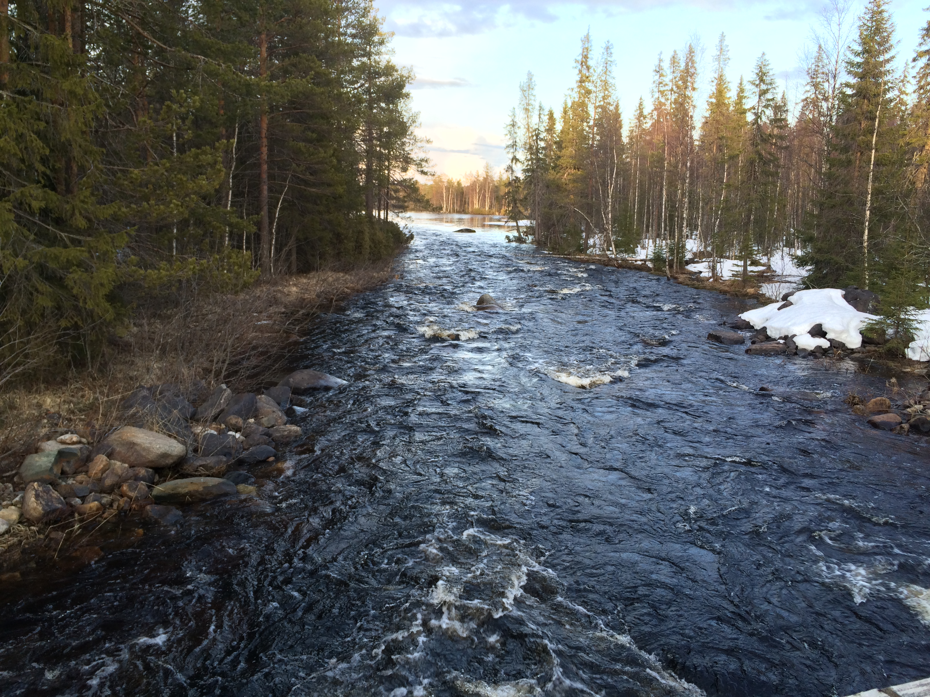 Коккойоки